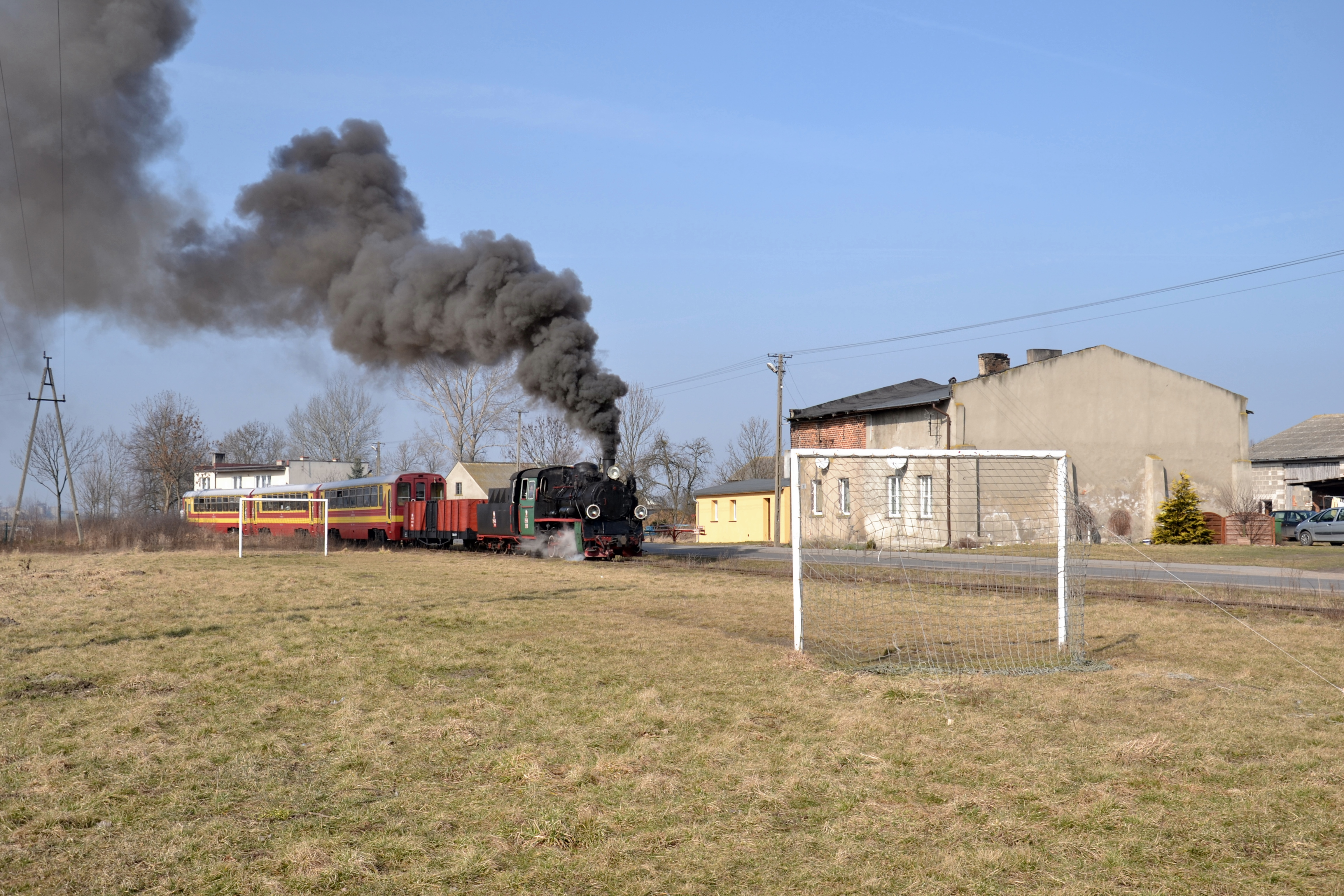 Px48-1919 z pociągiem turystycznym przed dawnym rozjazdem mijanki w Miroszce